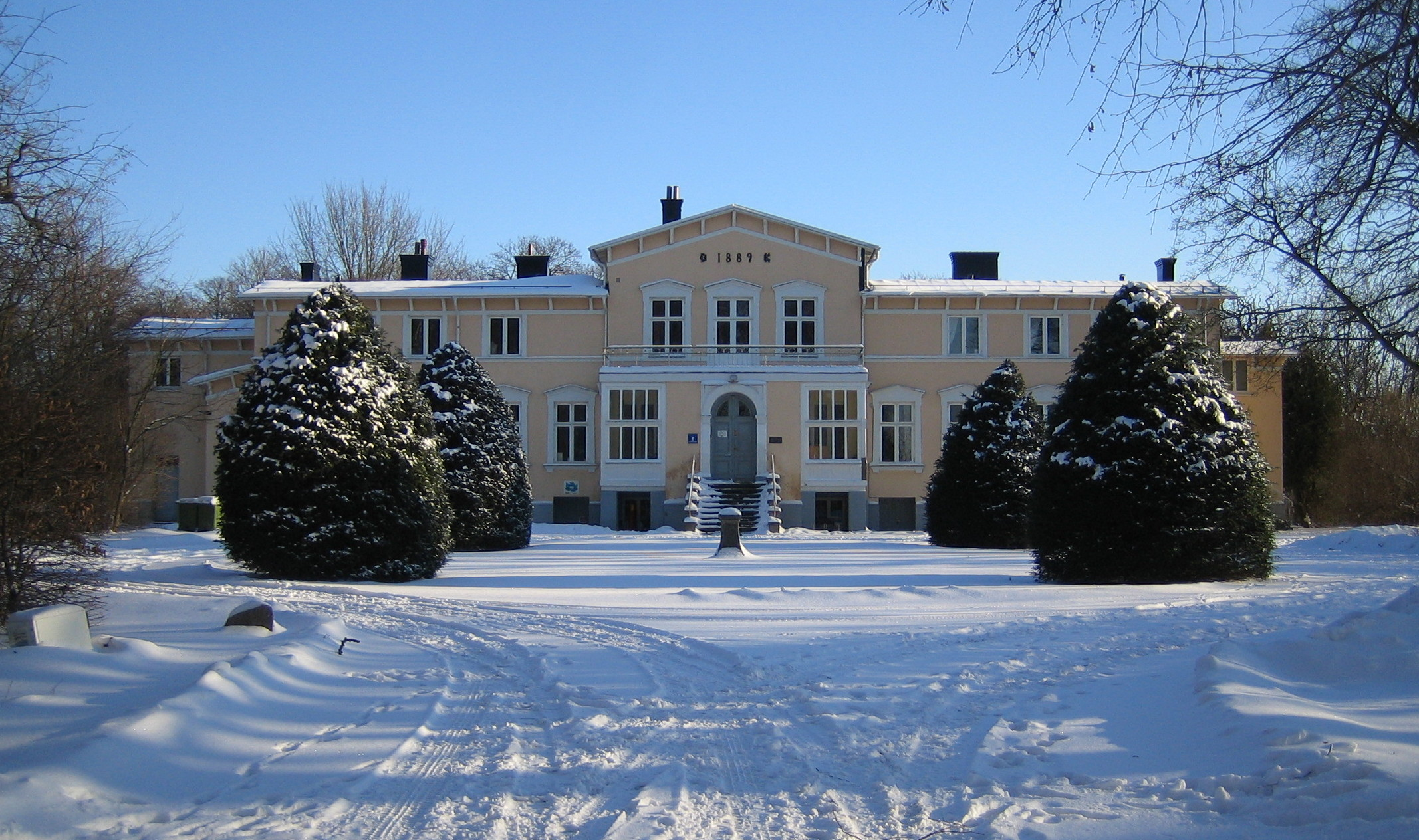 Bellevuegården in Malmö, Sweden.